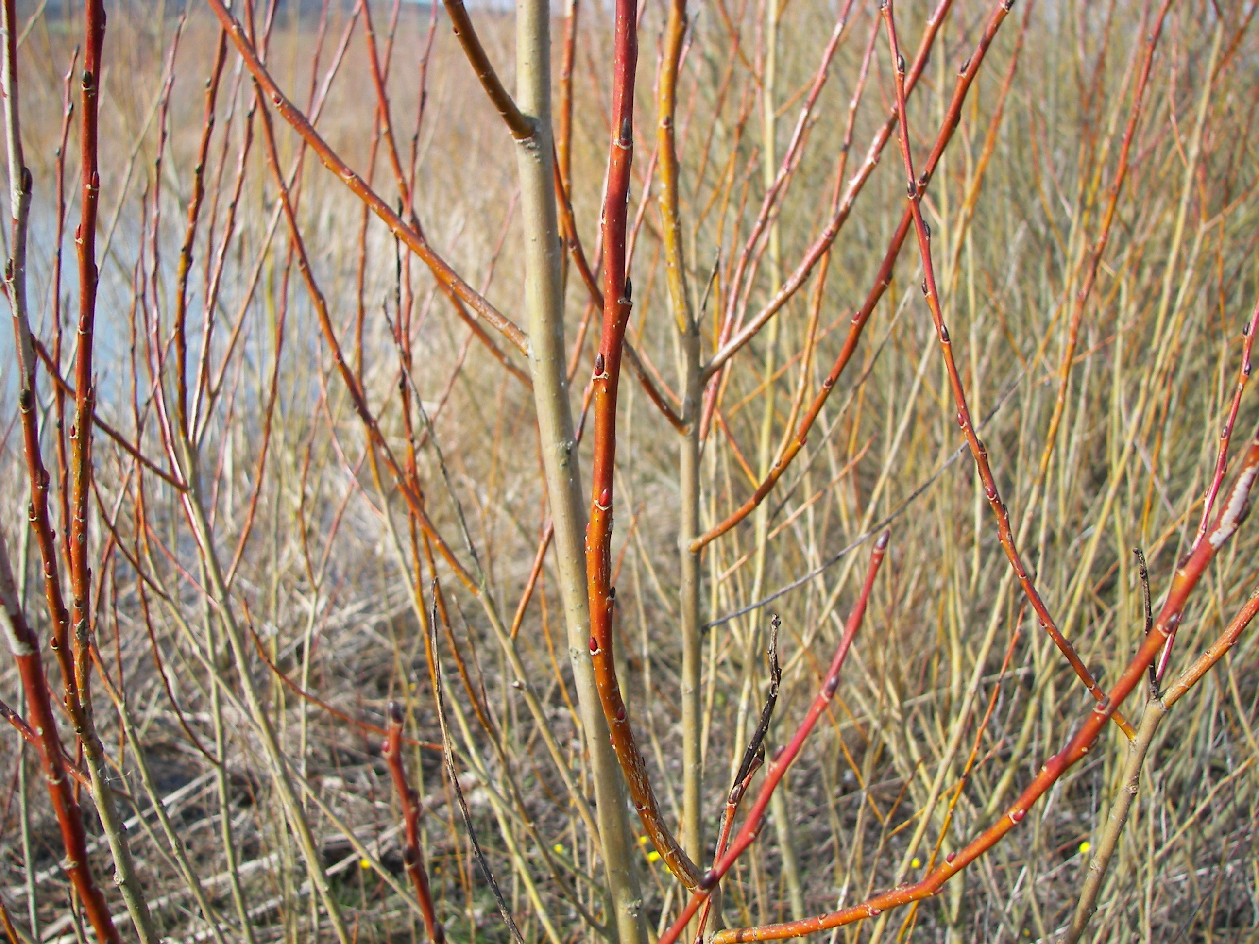 Purpurweise (Salix purpurea) bei Lahntal-Goßfelden, Landkreis Marburg-Biedenkopf, Hessen, Deutschland